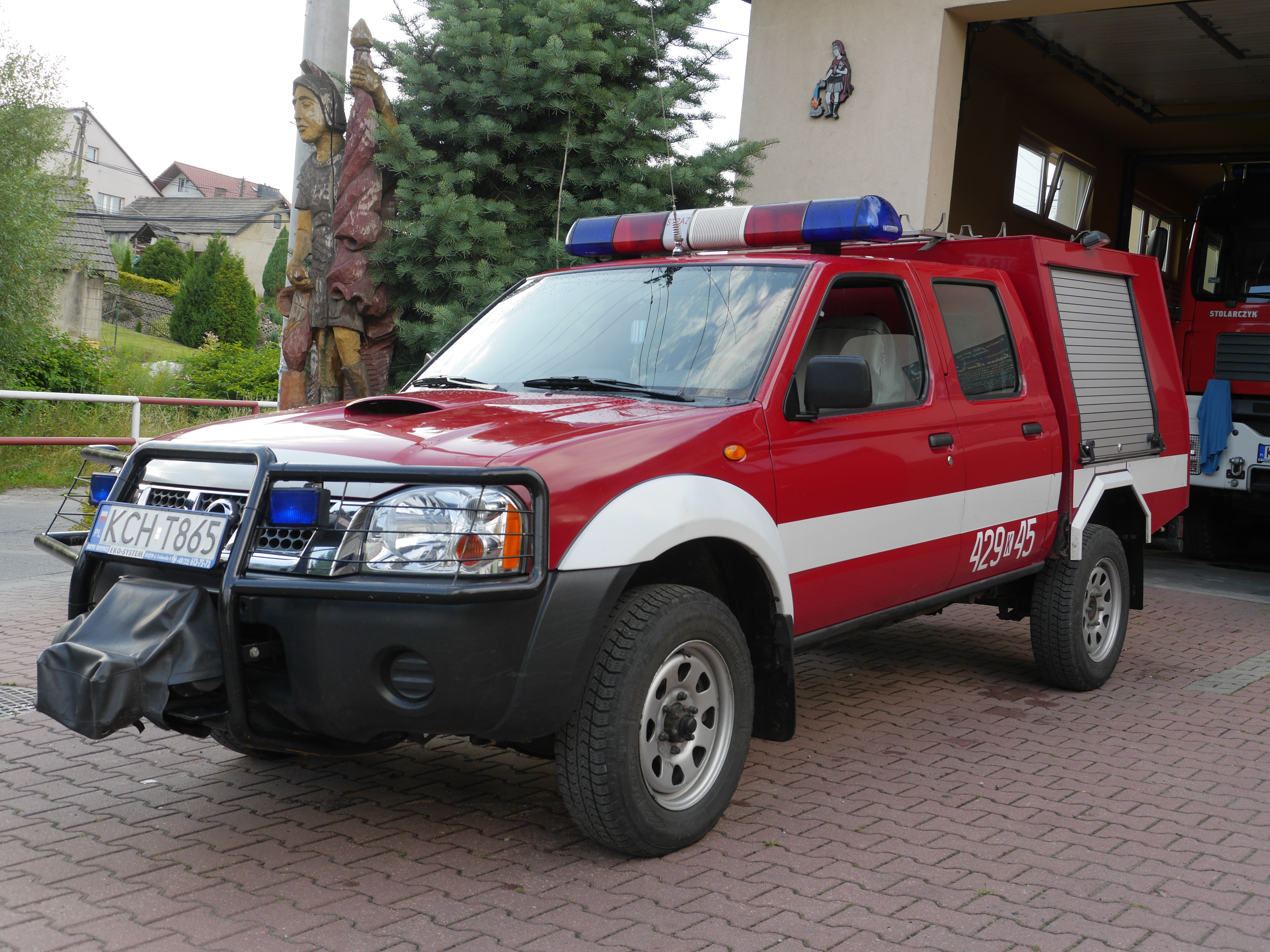 OSP Psary This photo was taken with Panasonic Lumix DMC-GH3 camera, thanks to Panasonic.You can see all photographs in category: Taken with Panasonic Lumix DMC-GH3.